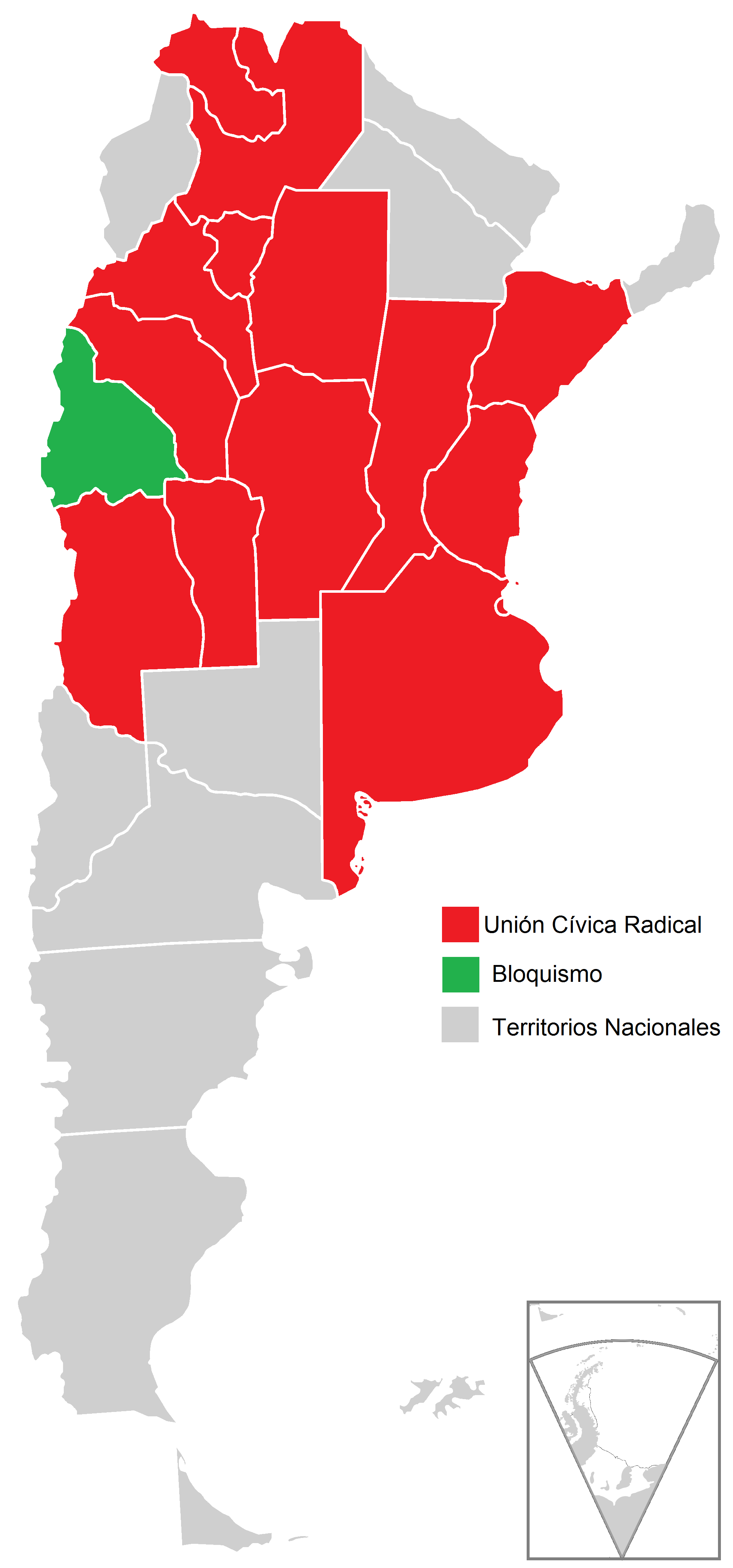 Mapa de las elecciones presidenciales de Argentina de 1928.